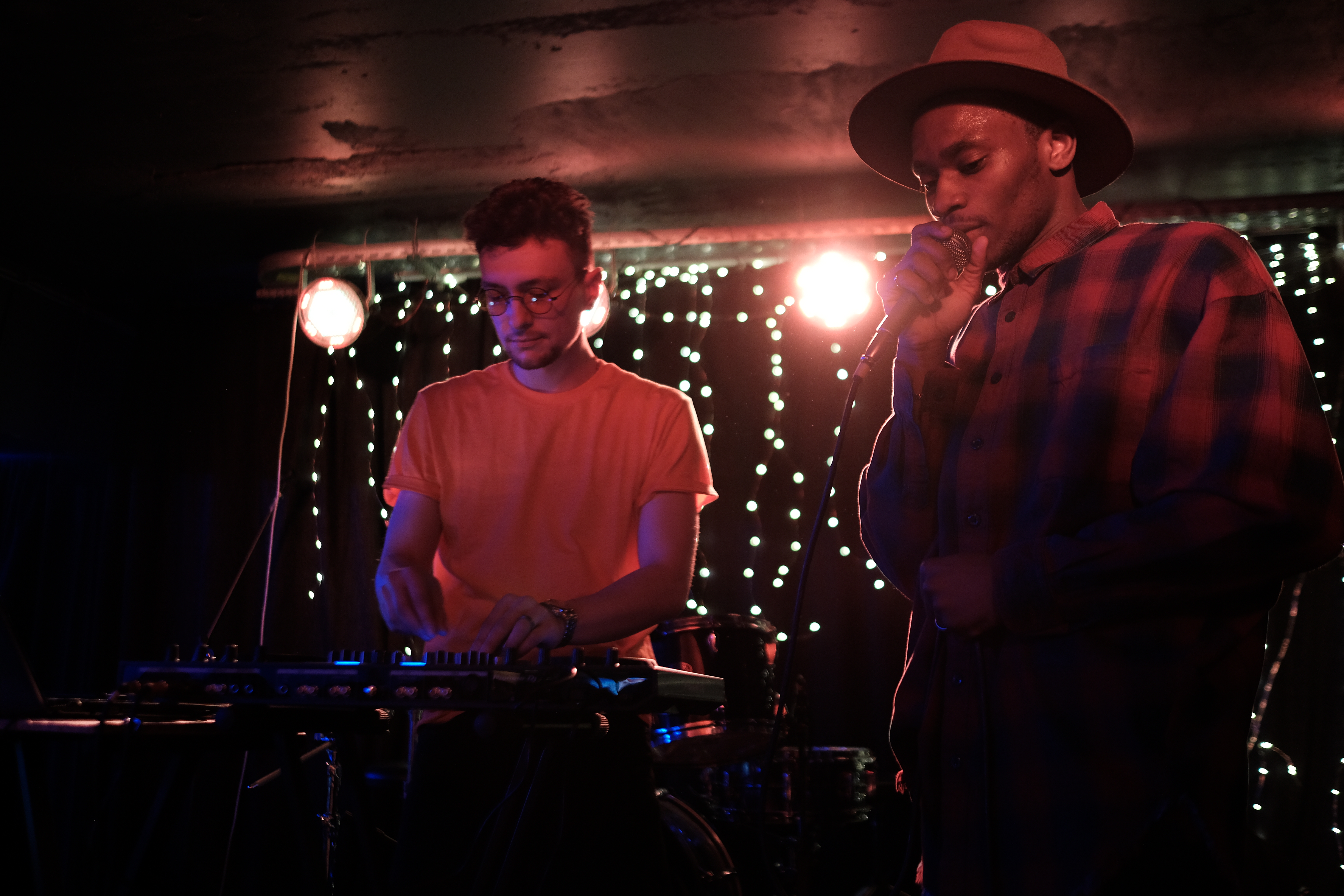 Учасники гурту "TVORCHI"